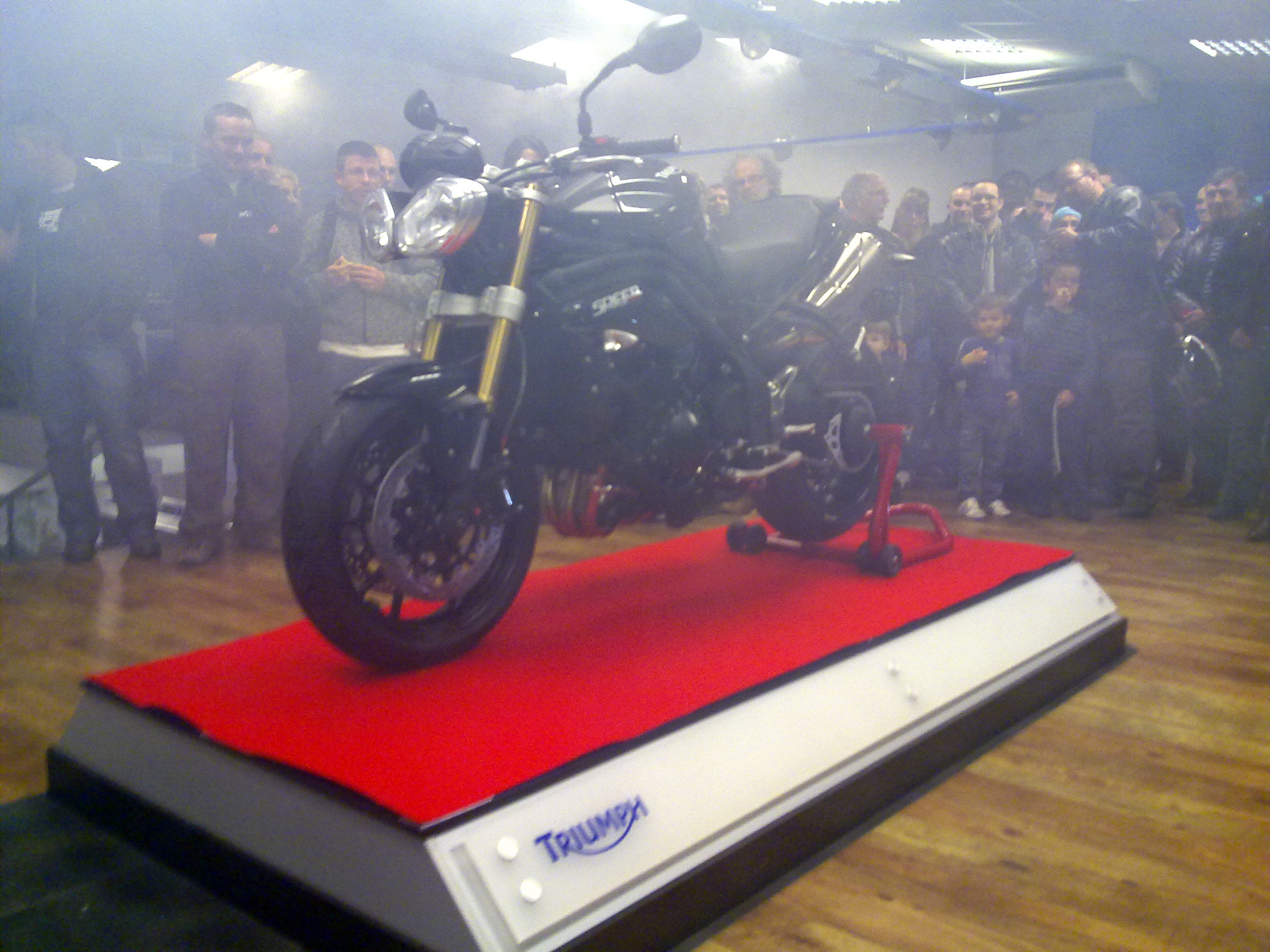 Présentation du nouveau Speed Triple 2011 à Grenoble